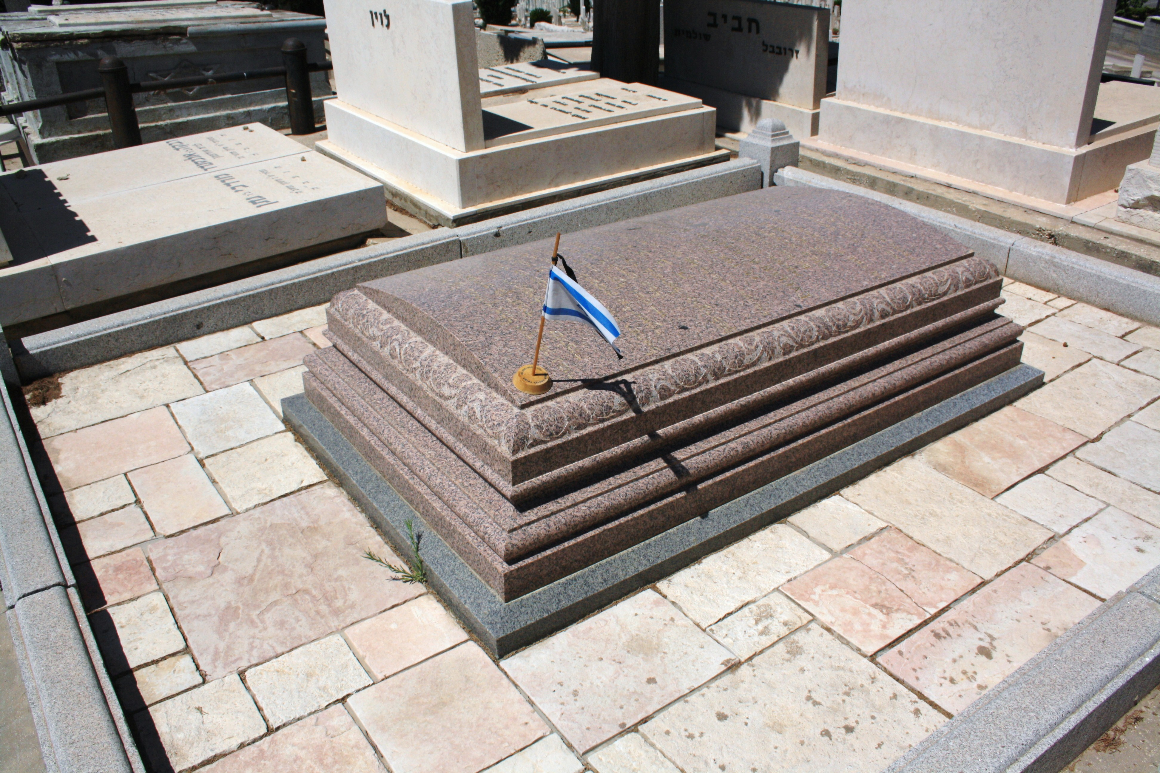 חלקת קברו של אוולין דה רוטשילד בראש הגבעה בבית העלמין הישן בראשון לציון.